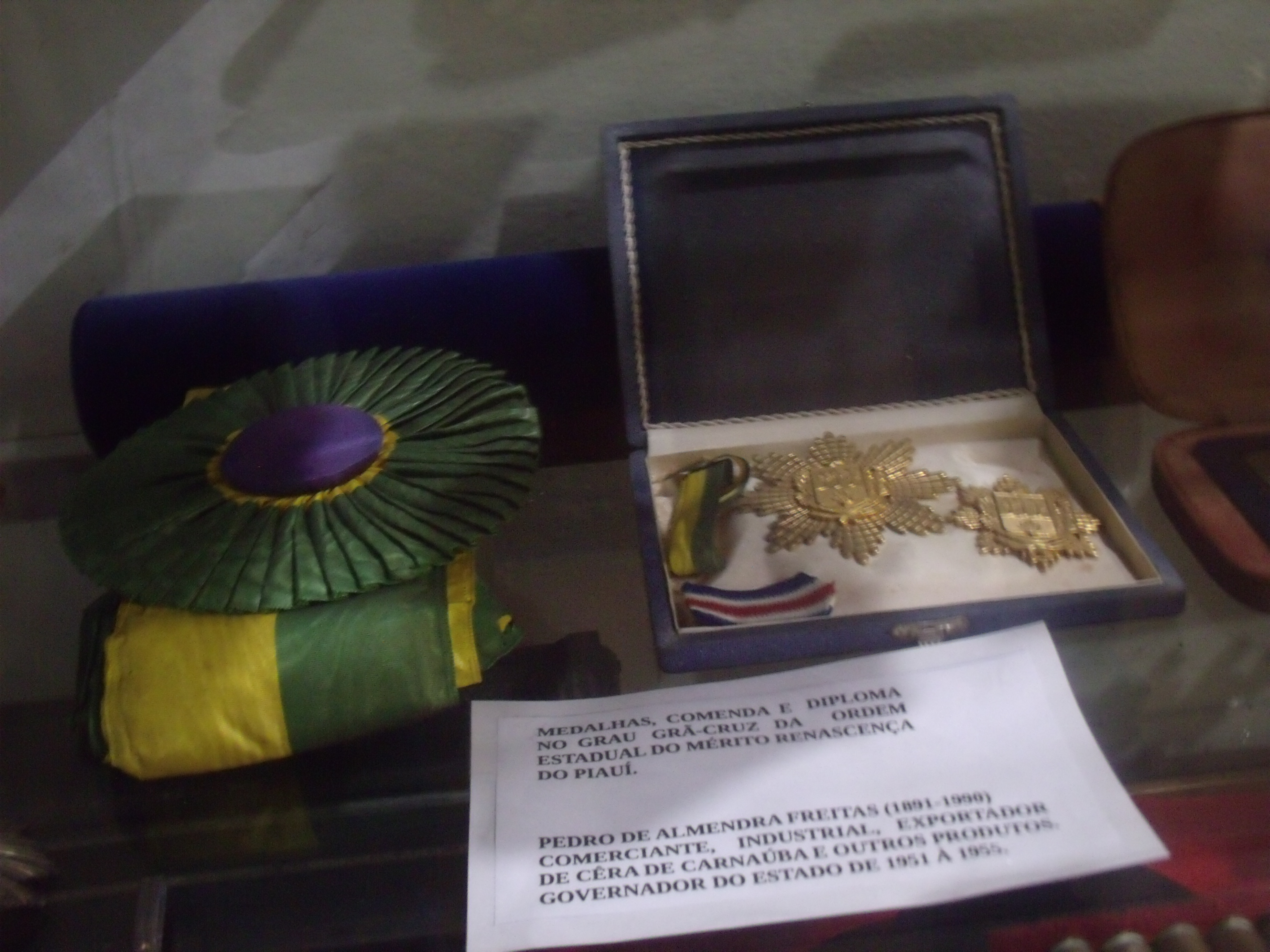 Insígnias da Ordem do Mérito Renascença do Piauí no acerdo do Museu do Piauí.